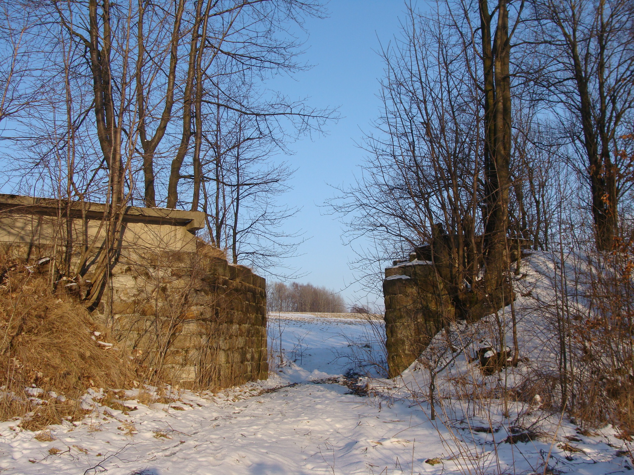 Zbytky mostu na Heřmaničce.